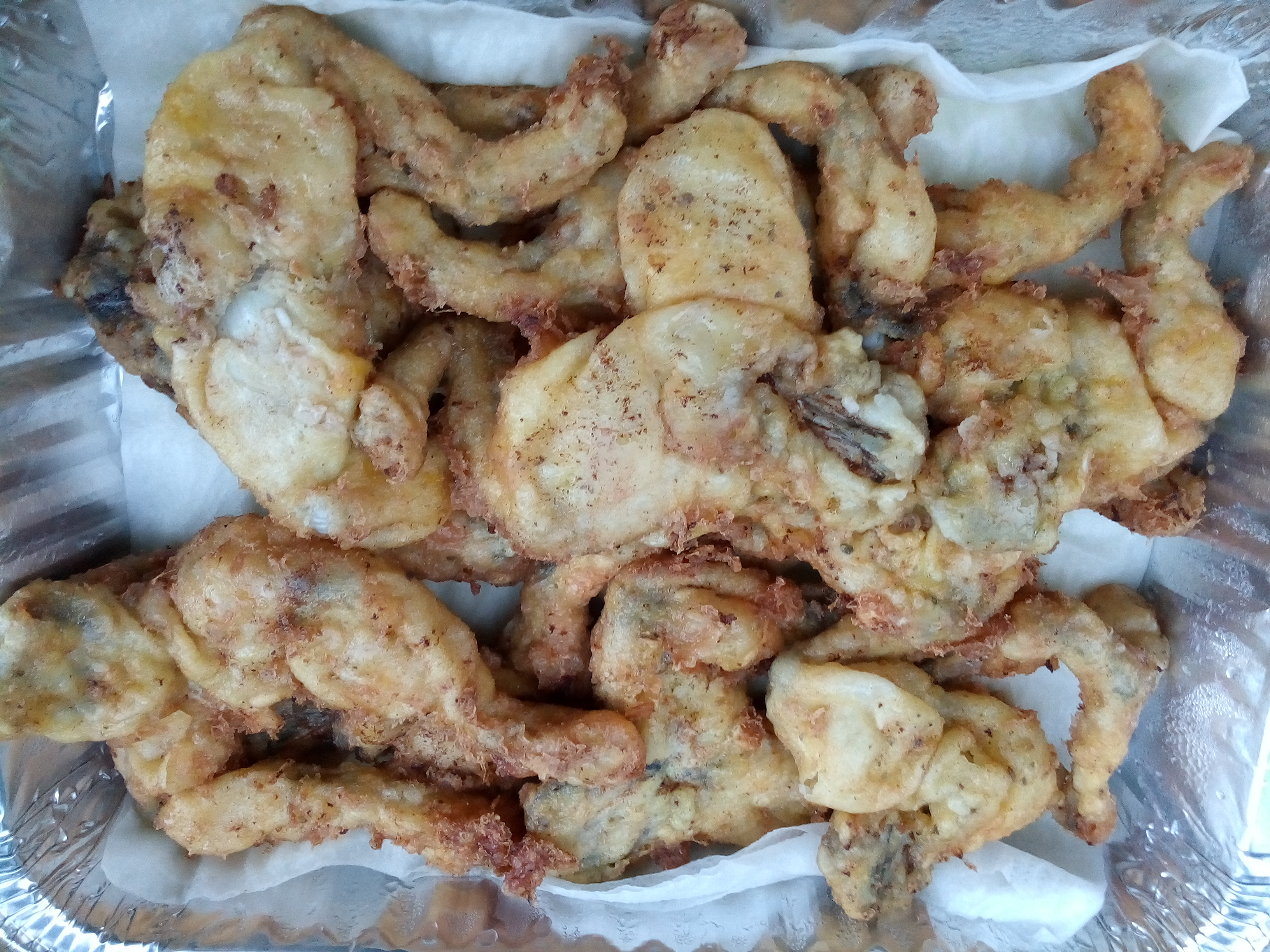 Rane fritte marsicane